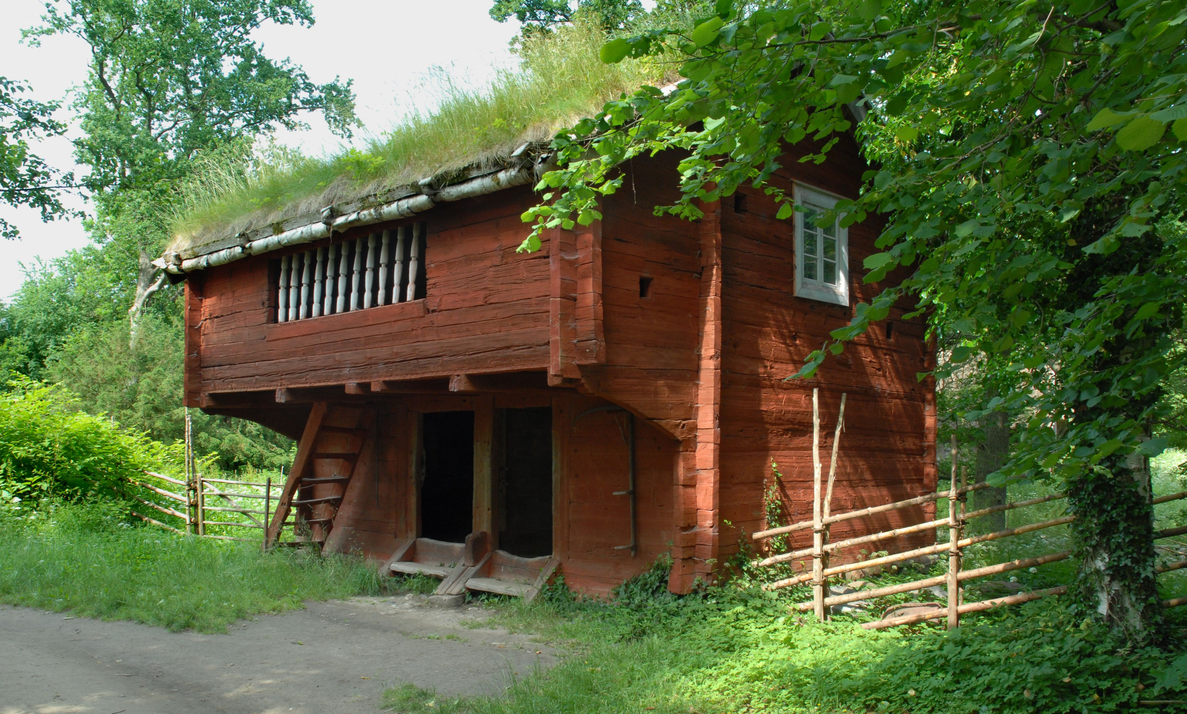 Loftboden fra Småland på Frilandsmuseet. Ved boden typisk raftehegn for egnen.